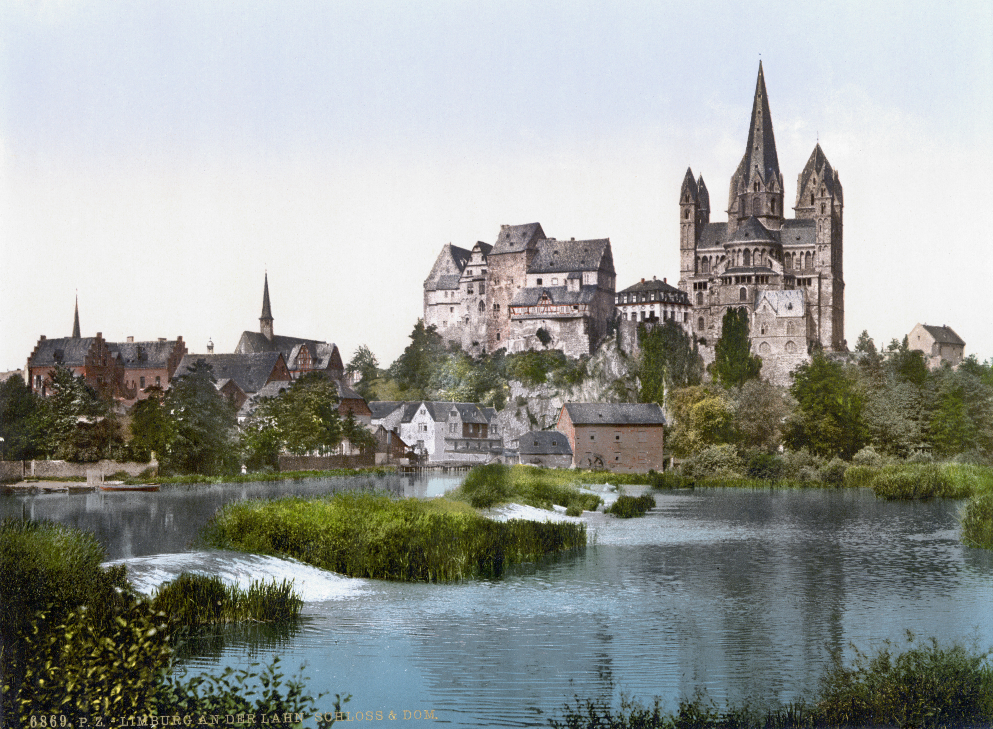 Limburg an der Lahn um 1900